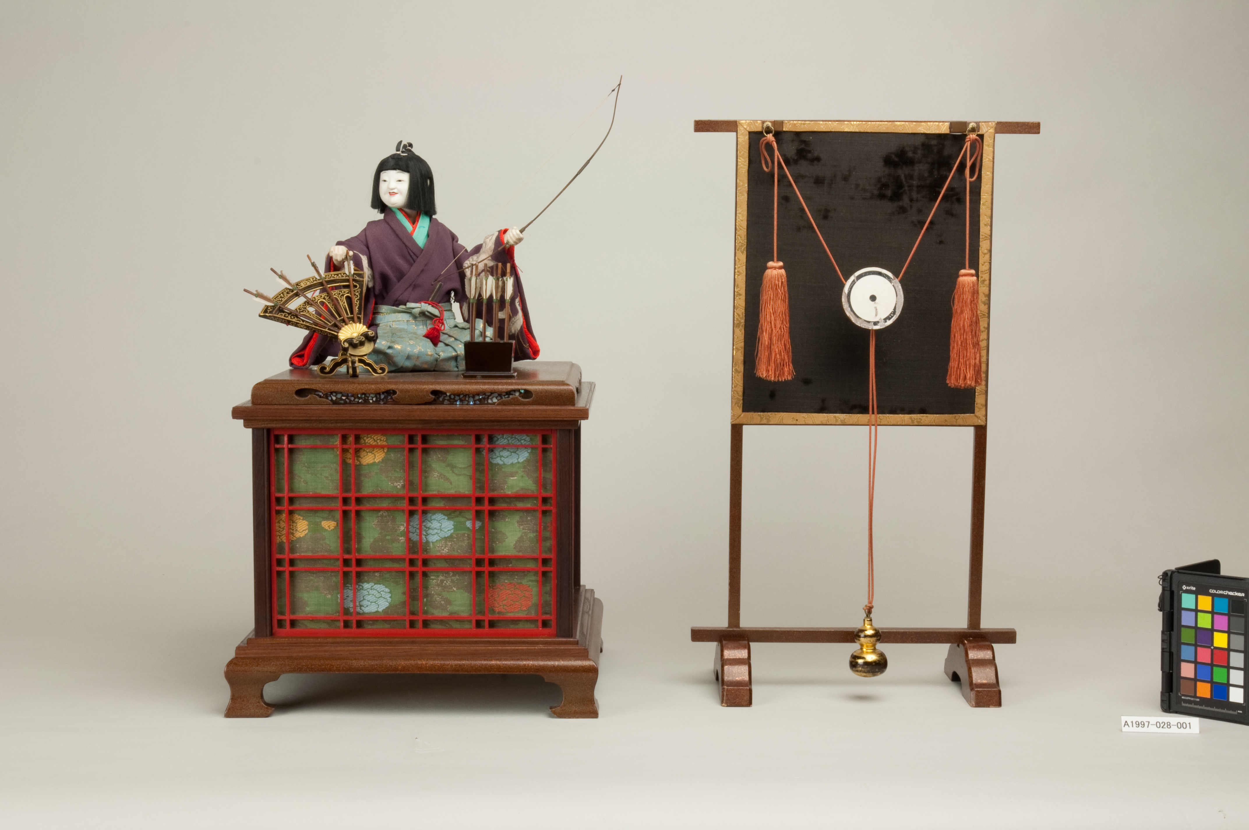 久留米市教育委員会蔵